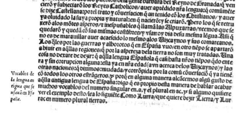 Lucio Marineo Siculo sobre la lengua vasca (vizcaina) en De rebus Hispaniae memorabilibus. Español. Obra compuesta por Lucio Marineo Siculo Cronista de sus Magestades de las cosas memorables de España. p. 41